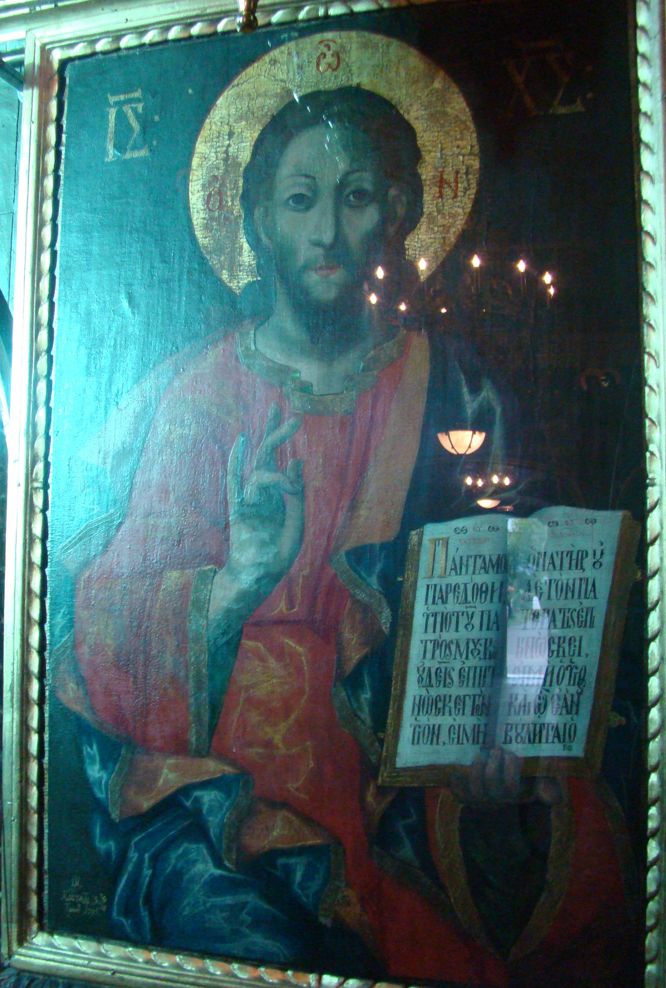 Biserica Ortodoxă Sf. Treime din Cluj